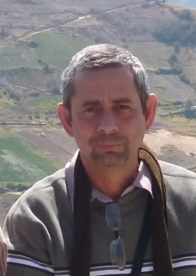 Escritor cubano Rigoberto Rodríguez Entenza